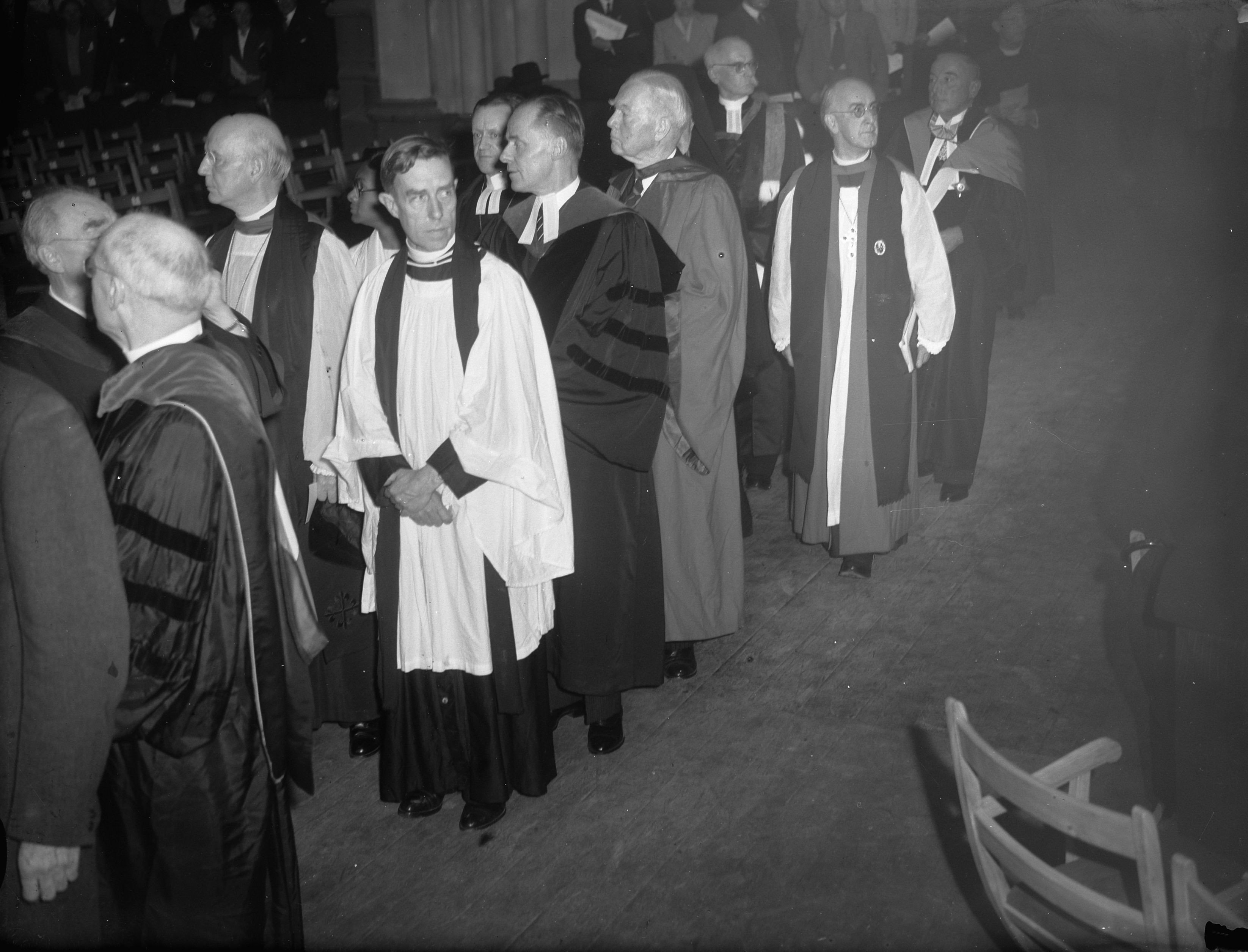 Collectie / Archief : Fotocollectie Anefo Reportage / Serie : [ onbekend ] Beschrijving : Congres Wereldraad van Kerken in de Nieuwe Kerk Datum : 22 augustus 1948 Trefwoorden : KERKEN, congressen Persoonsnaam : zGEEN Fotograaf : Steenkamp, […] / Anefo Auteursrechthebbende : Nationaal Archief Materiaalsoort : Glasnegatief Nummer archiefinventaris : bekijk toegang 2.24.01.09 Bestanddeelnummer : 902-9330